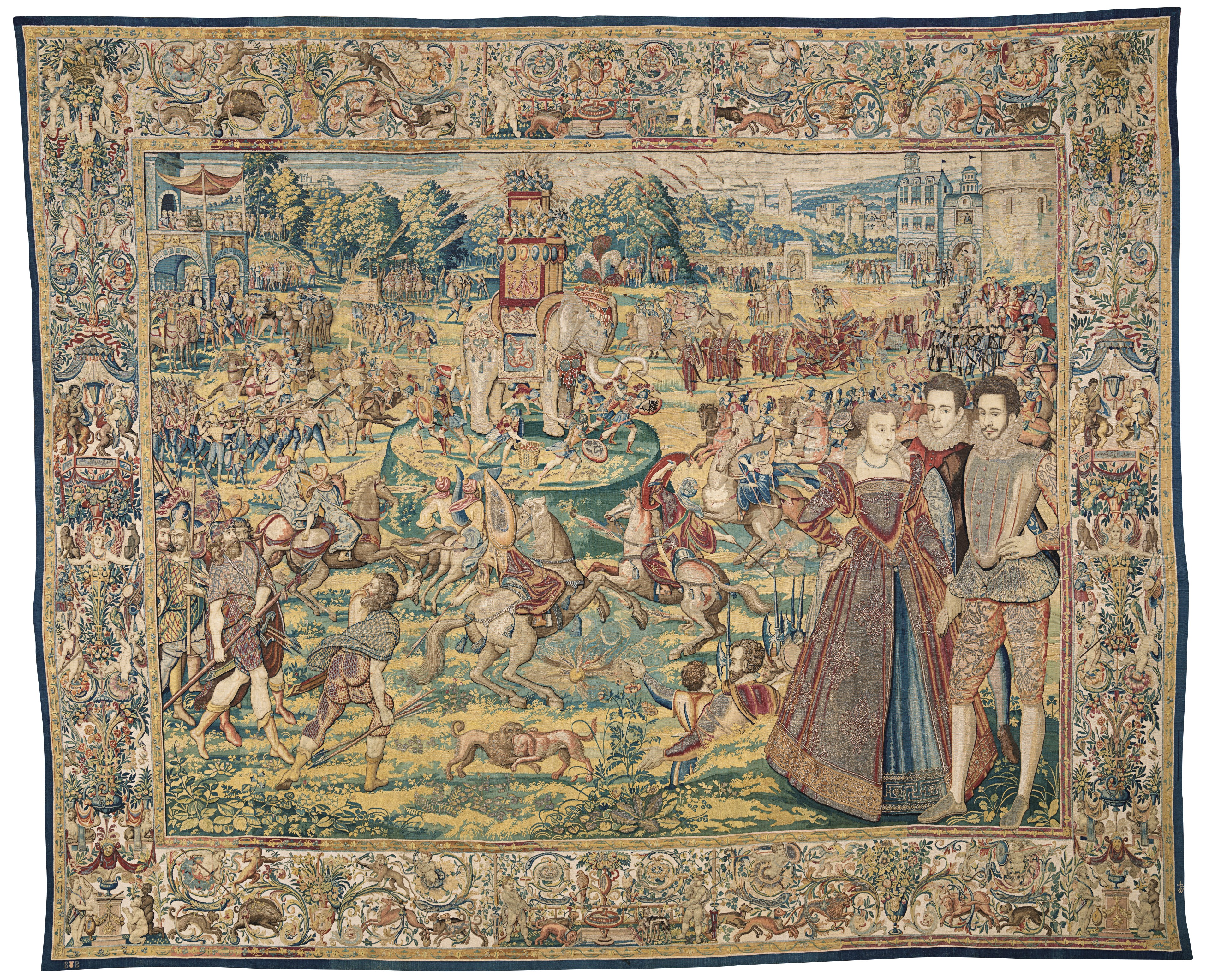 Tapisserie dite de « l'éléphant », appartenant à la série des « tapisseries des Valois » conservées au musée des Offices de Florence. Au premier plan, à droite, figurent Marguerite de Valois et son frère le duc François d'Anjou.